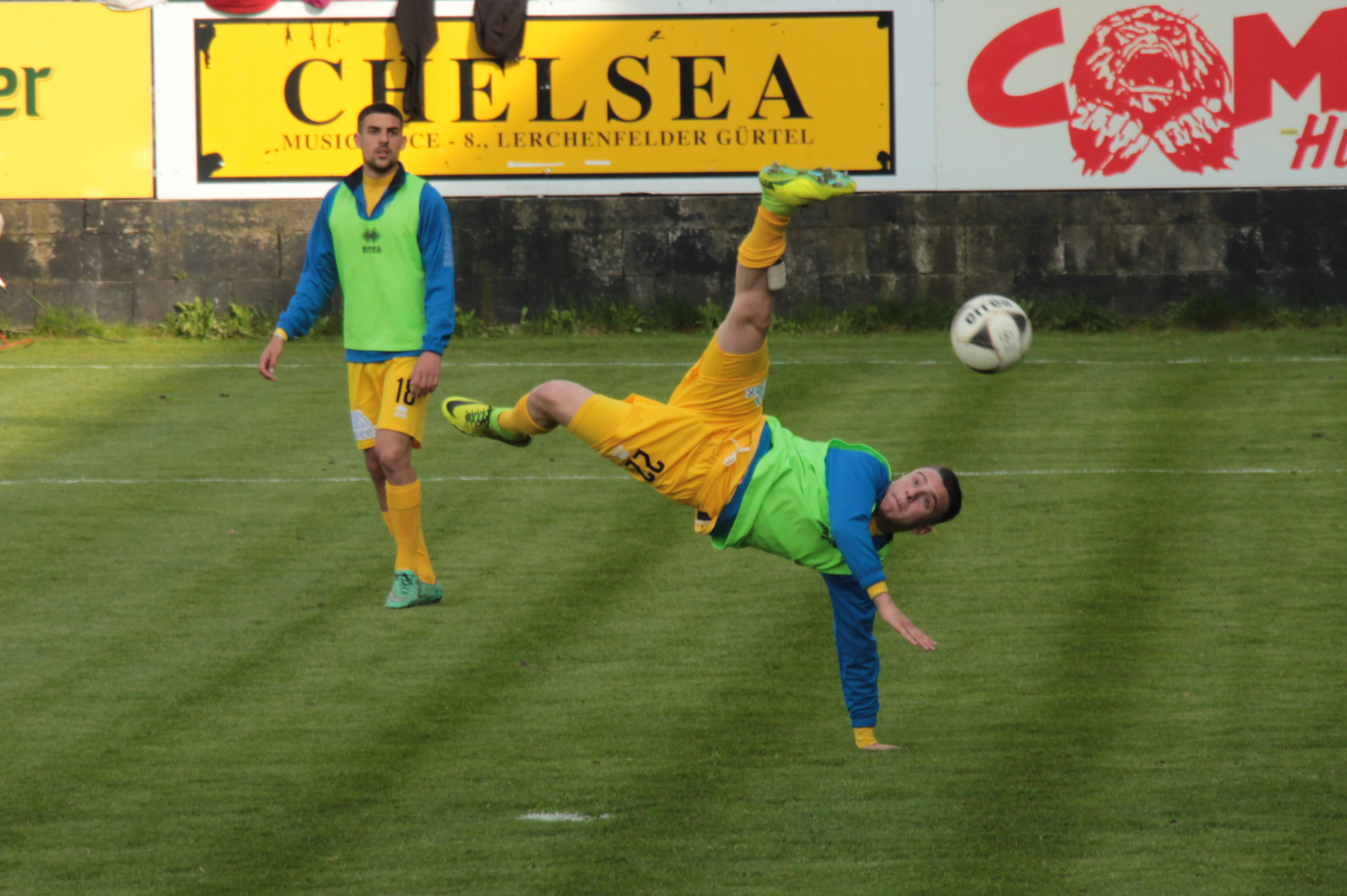 Ali Sahintürk (22) und Luka Rajic (18) beim Aufwärmen in der Halbzeitpause des Spiels Wiener Sportklub gegen First Vienna FC.